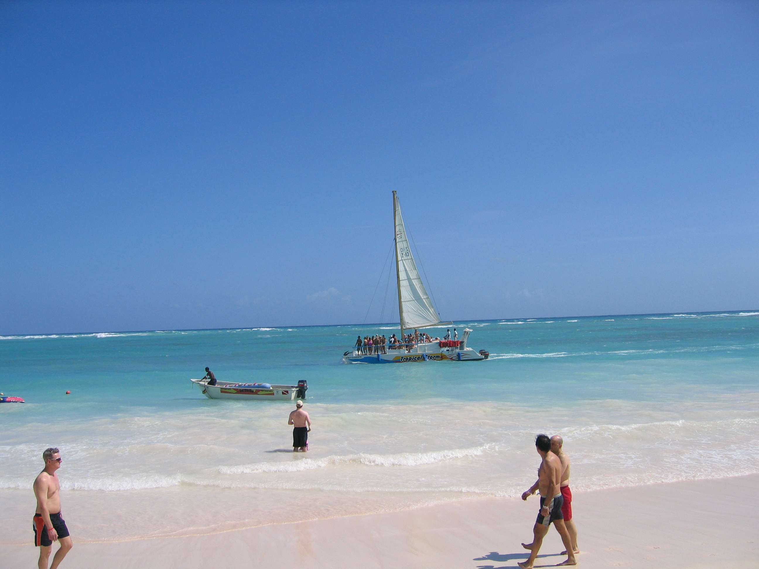 Playa Bavaro